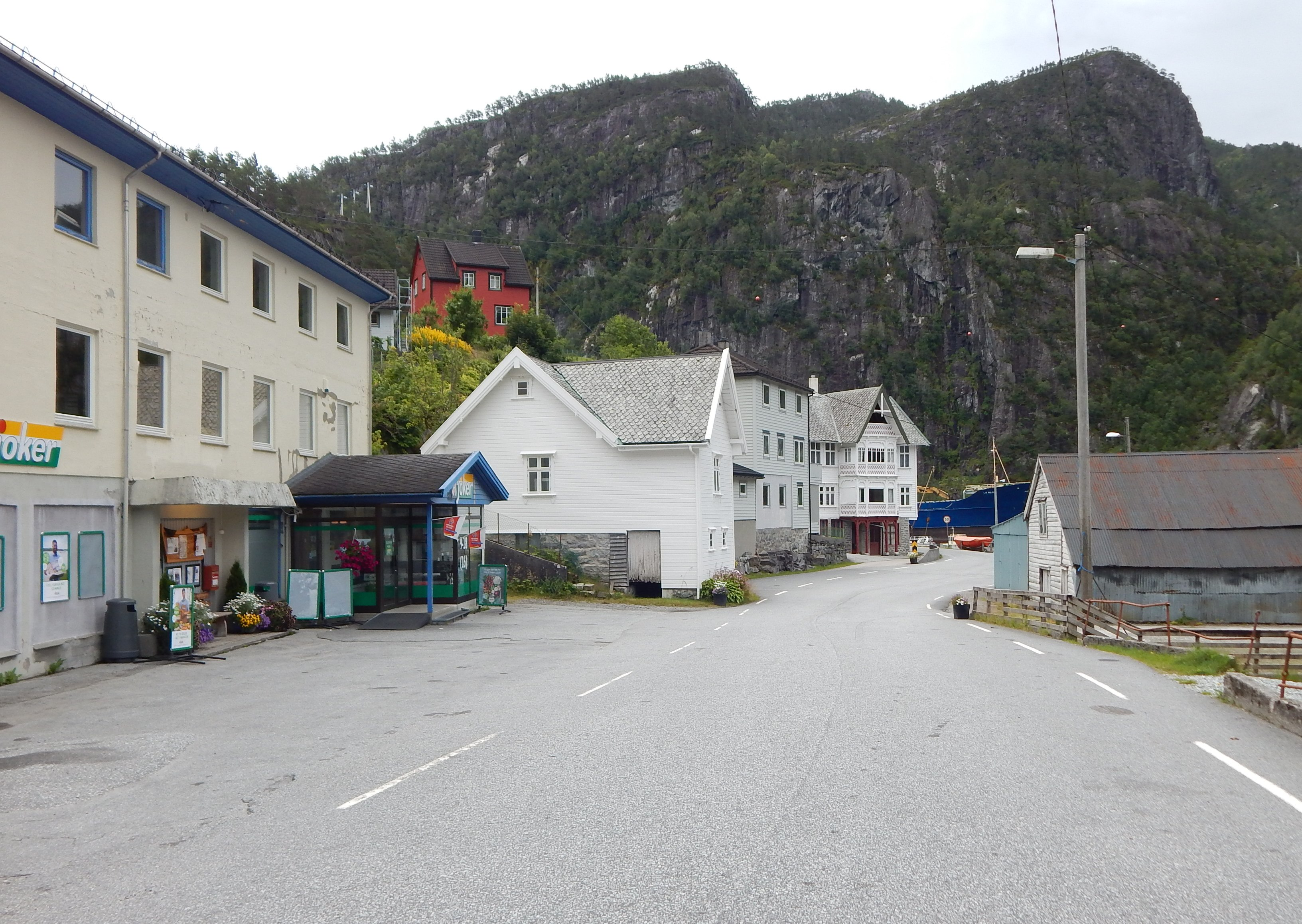 Stamnes med primær fylkesvei 569